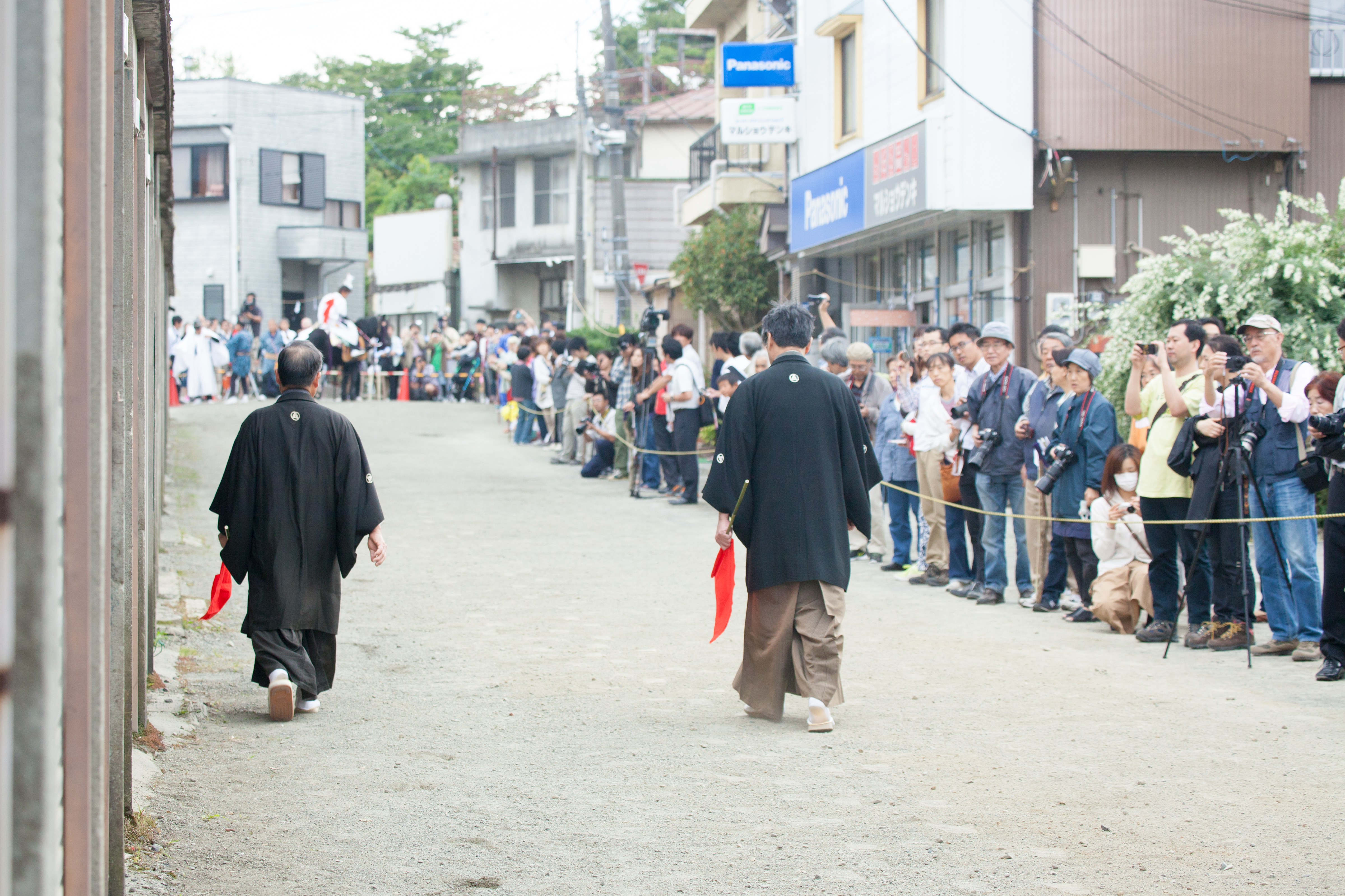 足跡を見て占う「占人